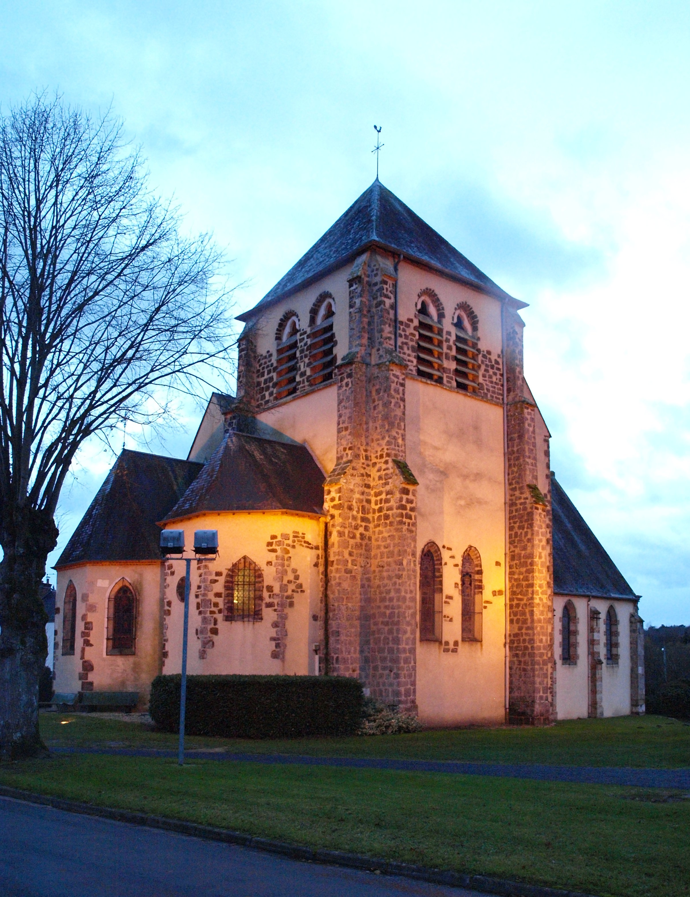 Église Saint-Martin d'Ennordres (Cher, France)